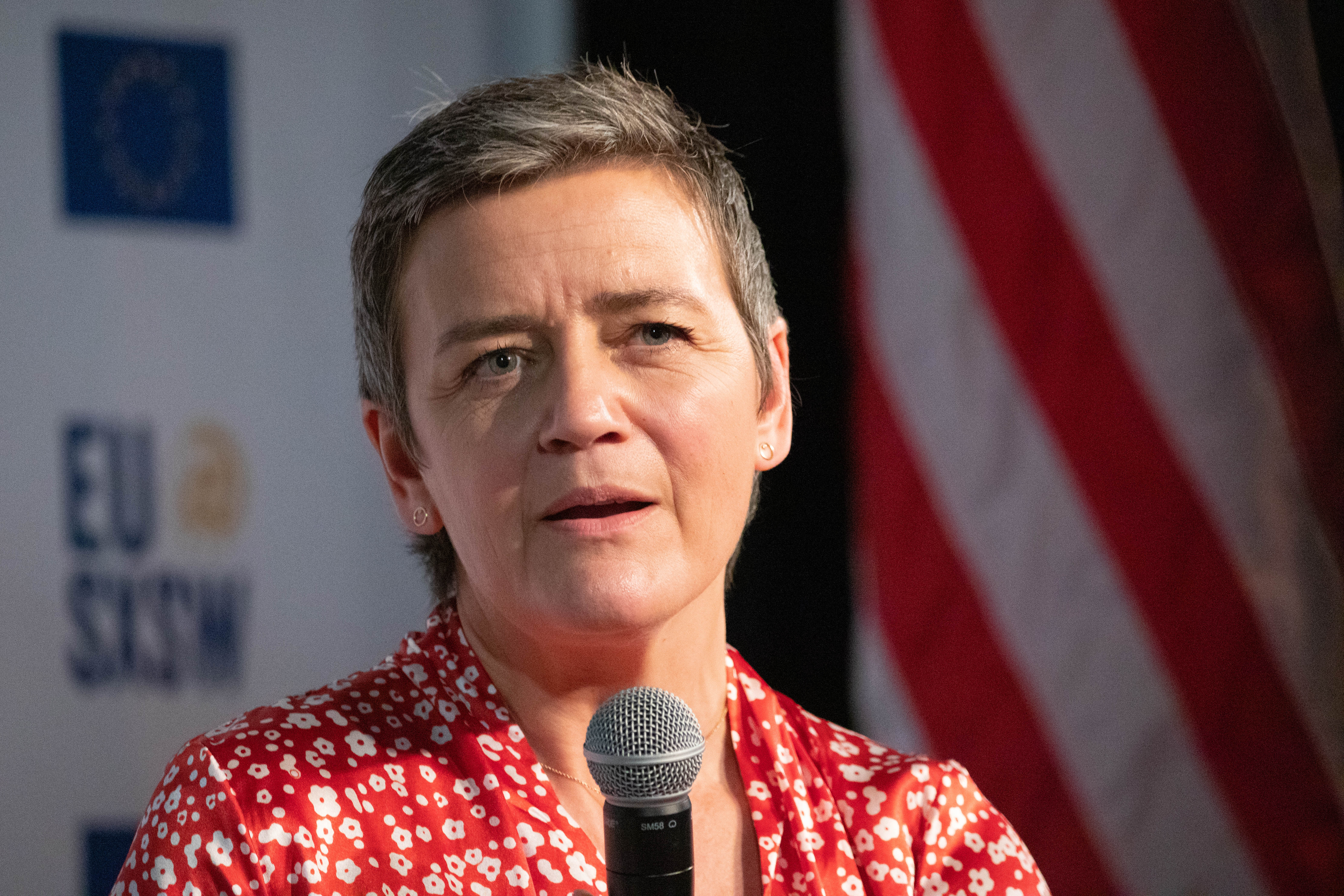 Photo: Ståle Grut / NRKbeta